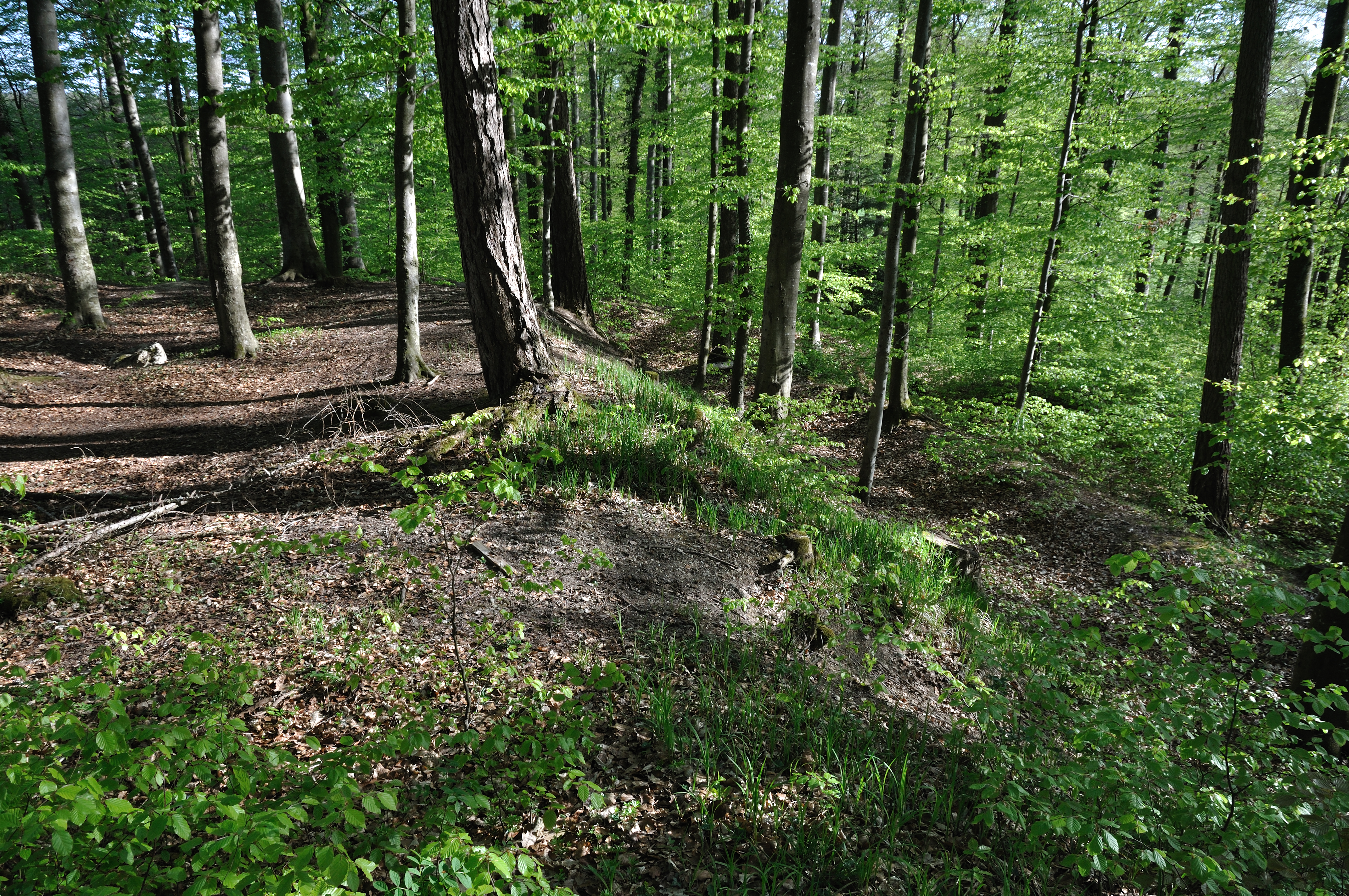 Burgstall Heidenschloss, Burgstandort und innerer Vorwall mit Vorgraben, rechts ist der äußere Vorgraben teilweise zu sehen, Friedrichshafen, auf dem Drumlin Weiherberg